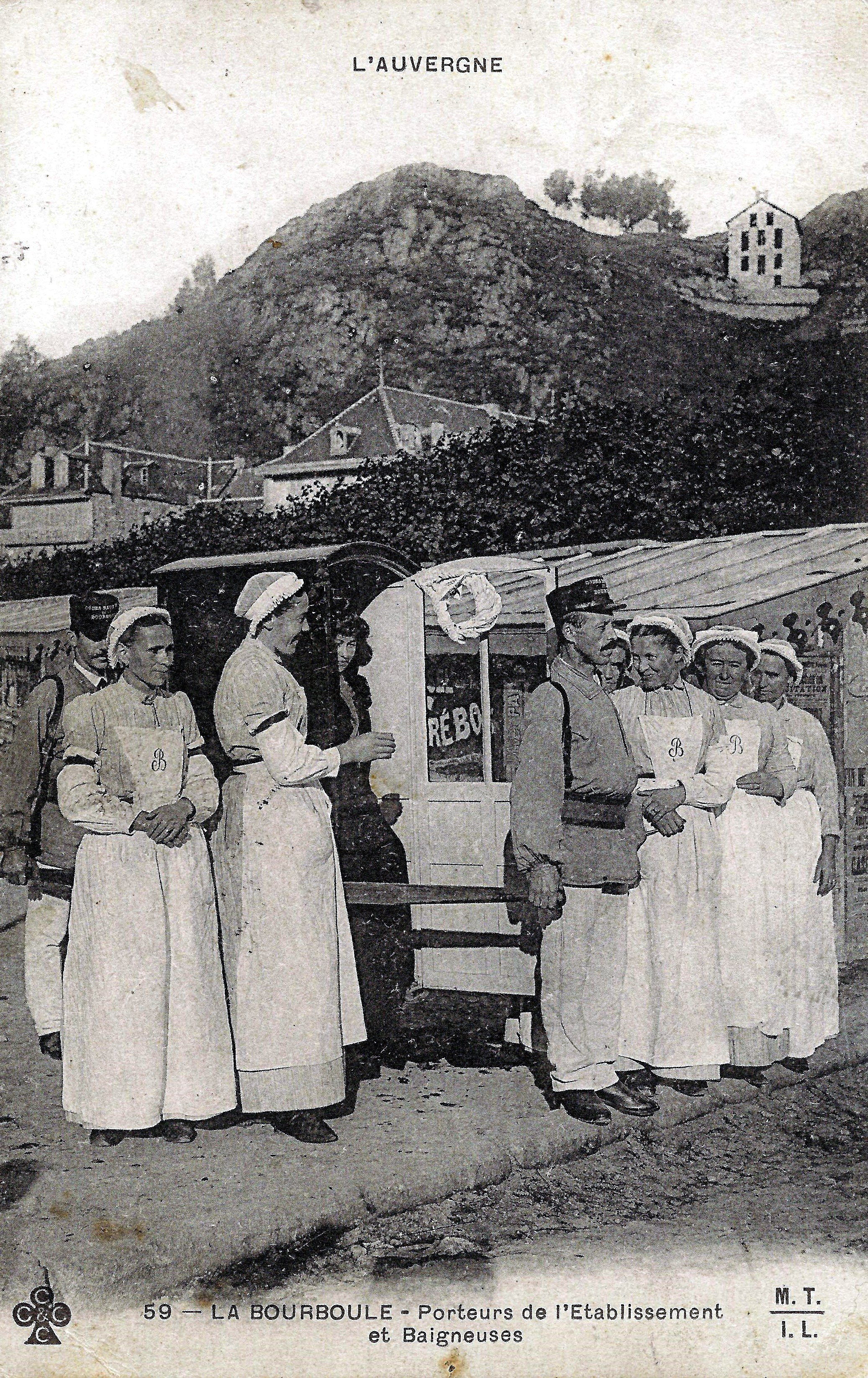 La Bourboule, Puy-de-Dôme, France : Station thermale, porteurs et baigneuses